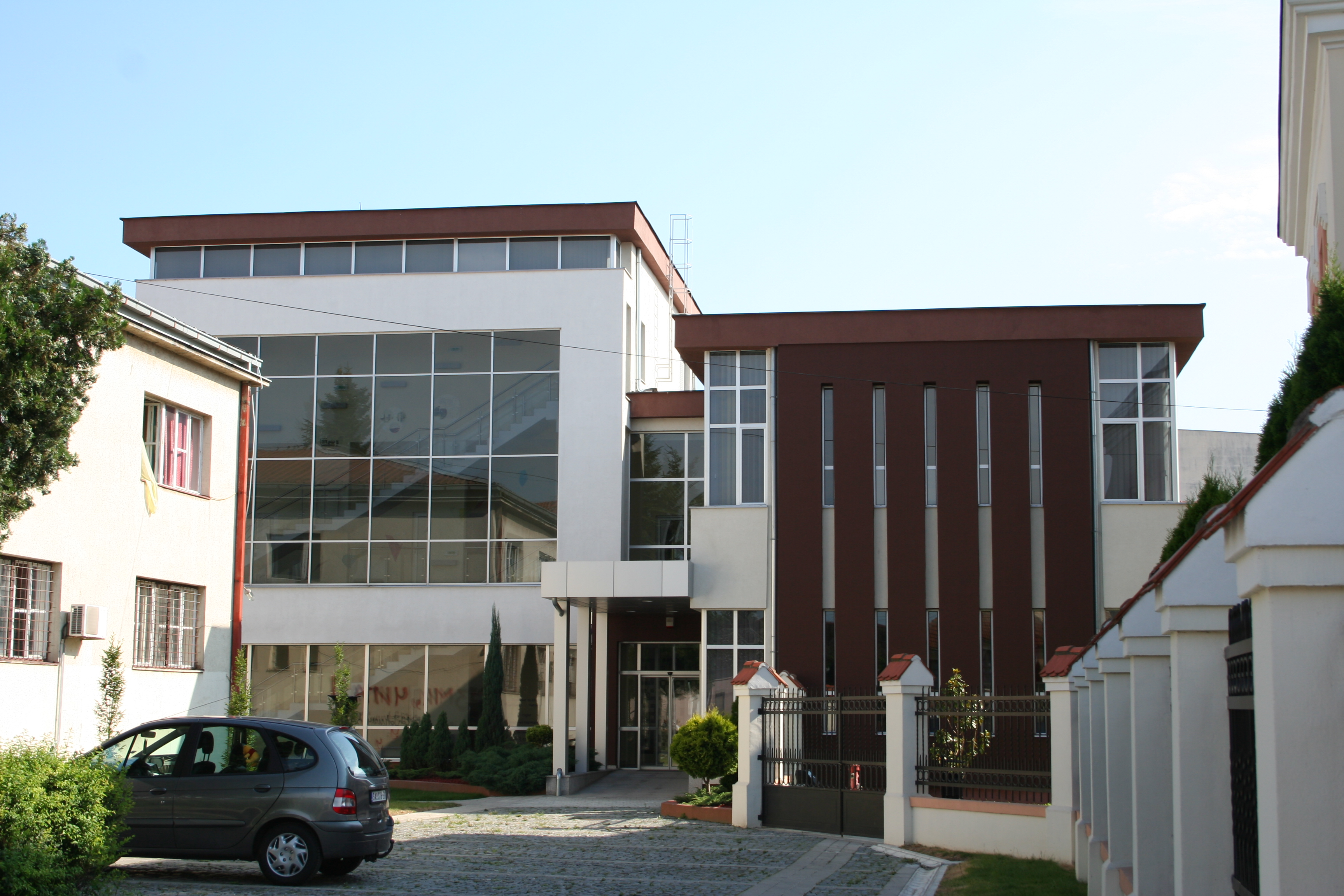 Narodna biblioteka-depadans, Šabac